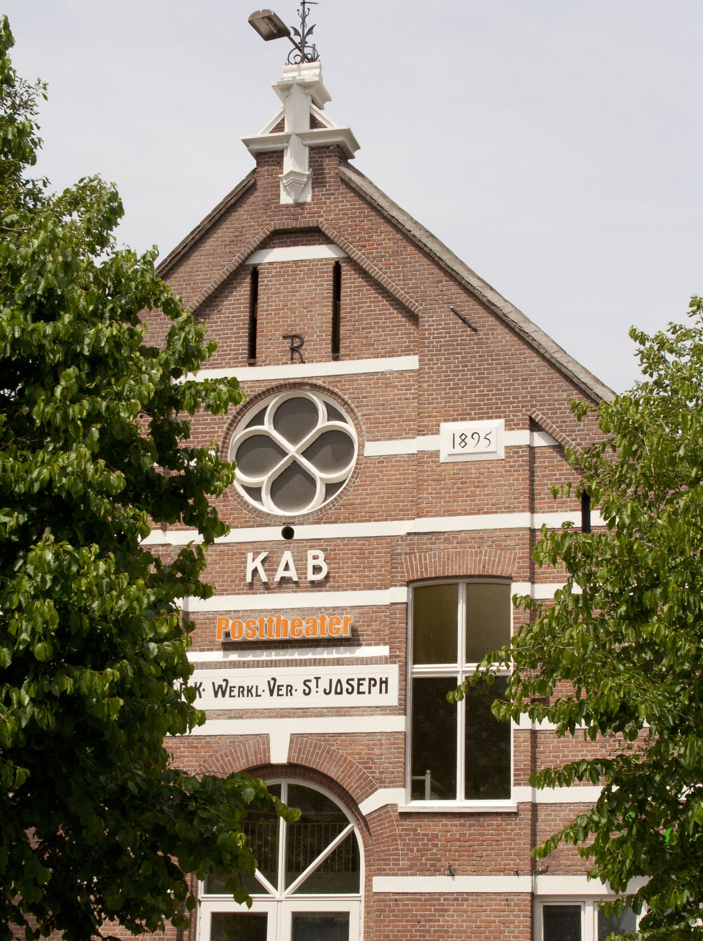 Het Posttheater